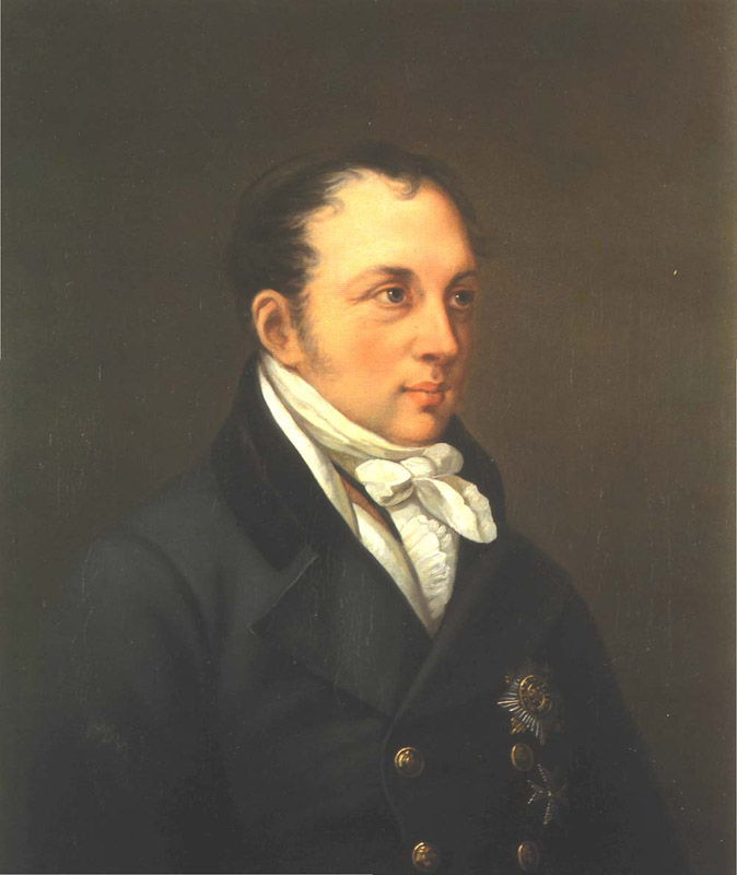 Энгельгардт Егор Антонович (1775-1862). Педагог, ученый, публицист.